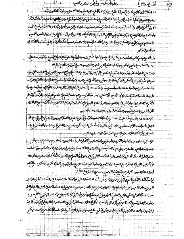 Texte en arabe d'une pétition en provenance de Salé contre l'application du Dahir berbère, pour la remise de laquelle Ahmed Hajji, Ahmed El Jariri et Abou Bakr Zniber avaient demandé une audience auprès du sultan Mohammed ben Youssef (futur roi Mohammed V).